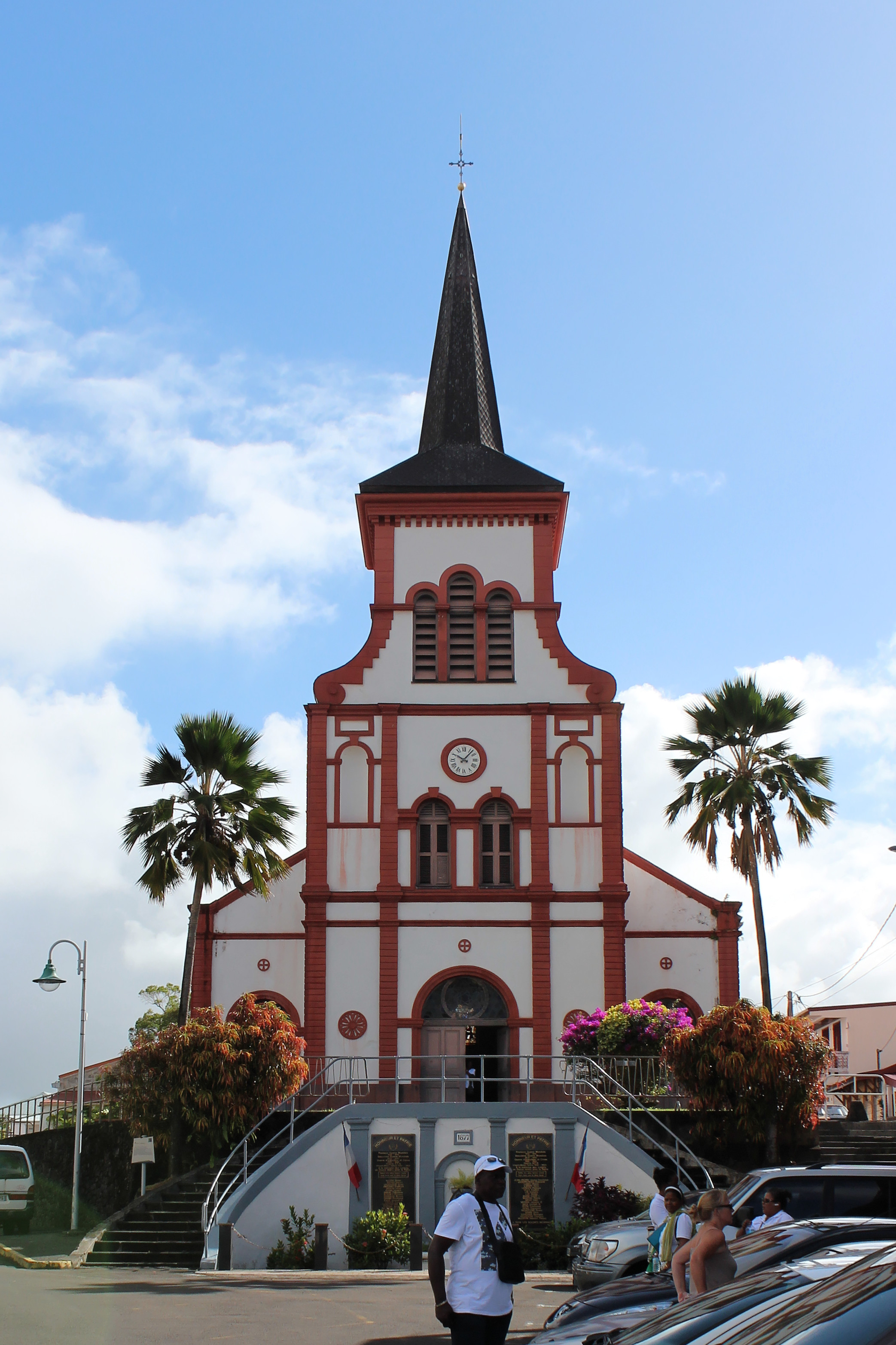 Église Notre-Dame-de-la-Nativité de Ducos